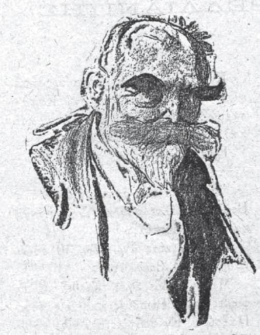 Künstlerkarikatur, Teil eines Kohlenstiftzyklus für die griechische Literaturzeitung Estia